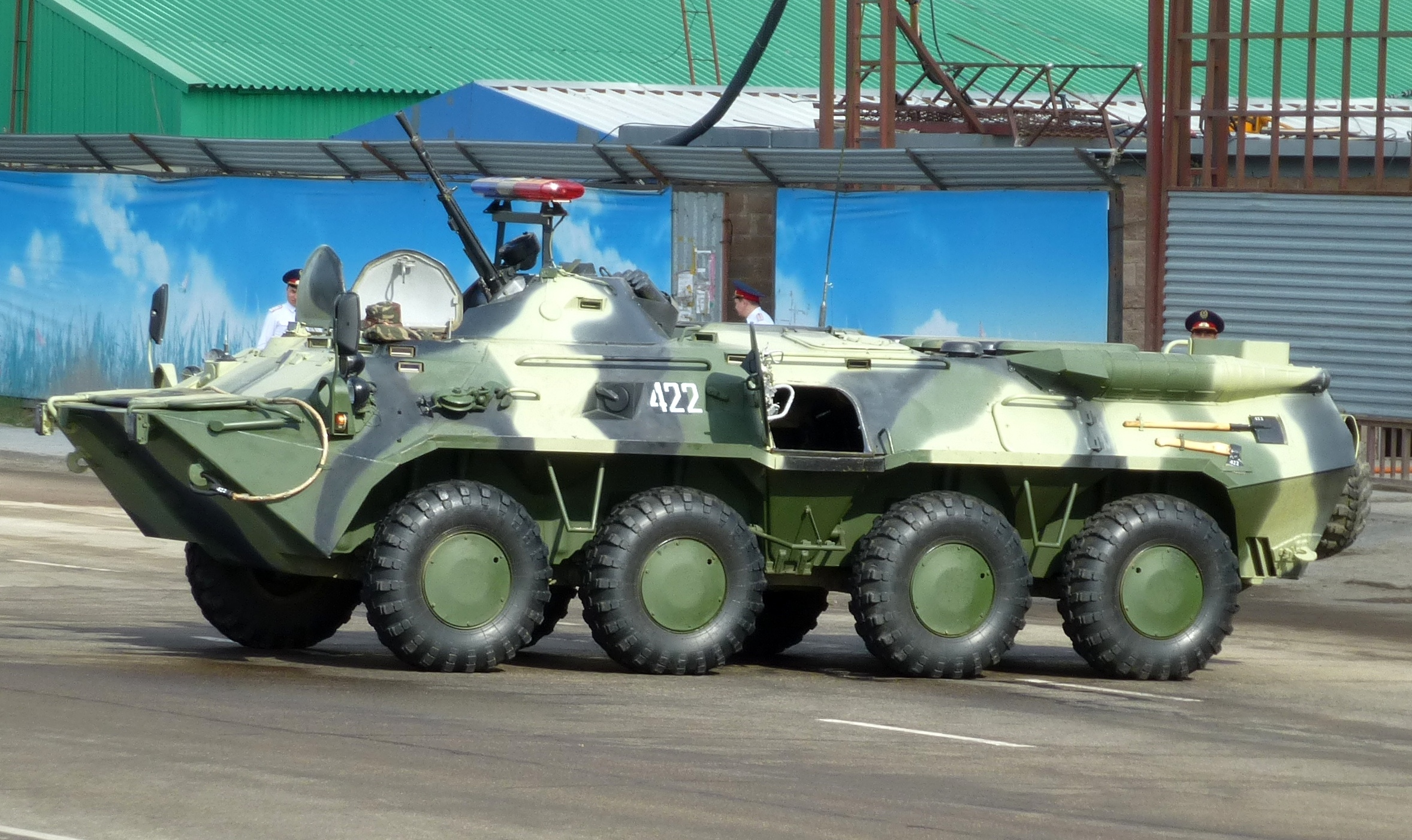 БТР-80 Военной Полиции Вооружённых Сил Казахстана. Видны проблесковые маячки над башней. Оцепление перед парадом в Нур-Султан 7 мая 2015 года